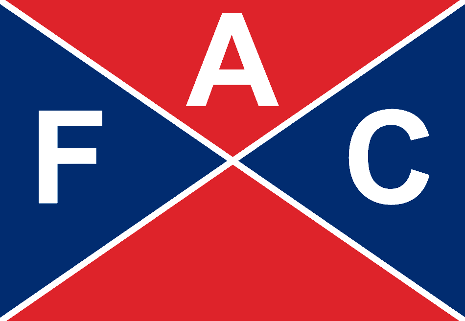 Bandera del Albion Football Club